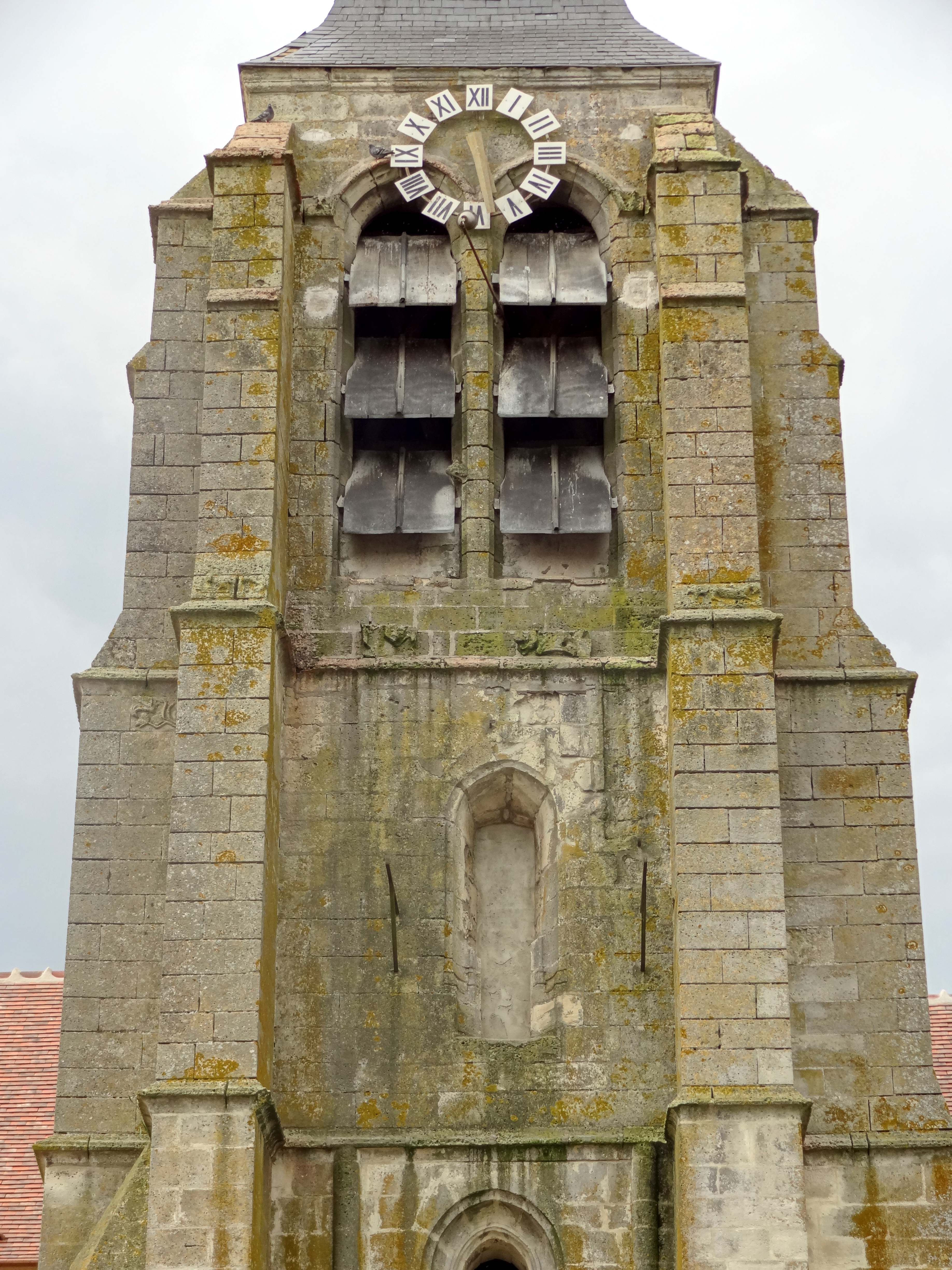 Église Saint-Denis de Ver-sur-Launette - voir titre.